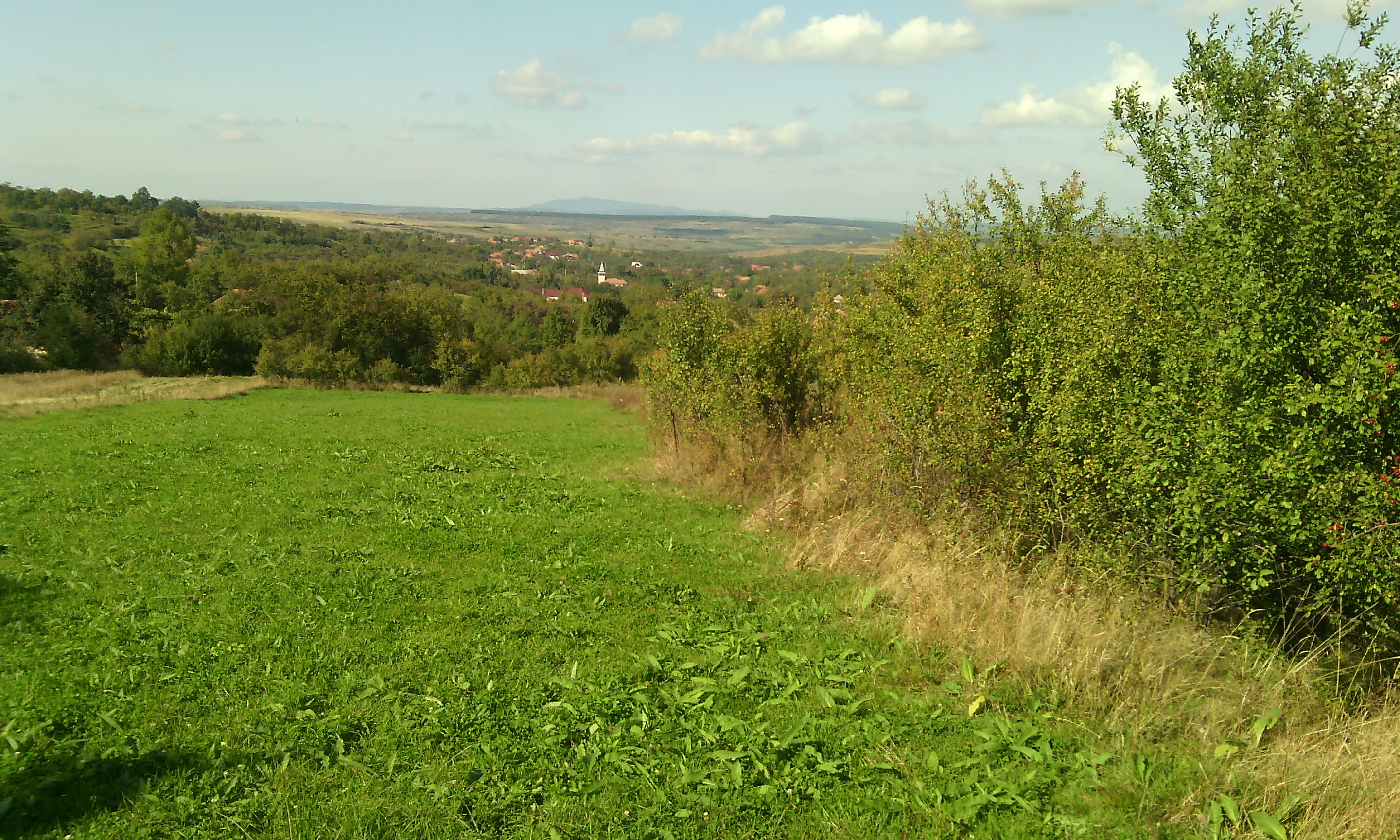 Satul Pria, judeţul Sălaj.